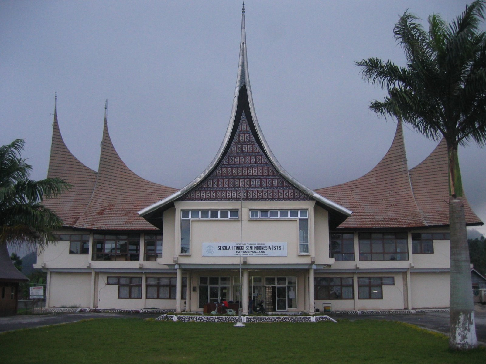 STSI Padang Panjang